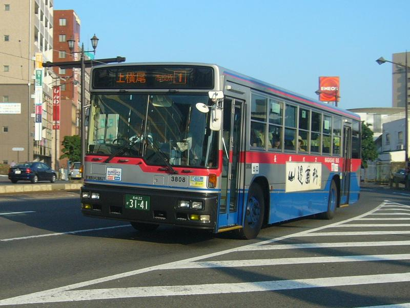 登録番号 長崎22か31-41 長崎自動車桜の里営業所所属 車番3808 2007年7月27日 長崎駅前にて撮影